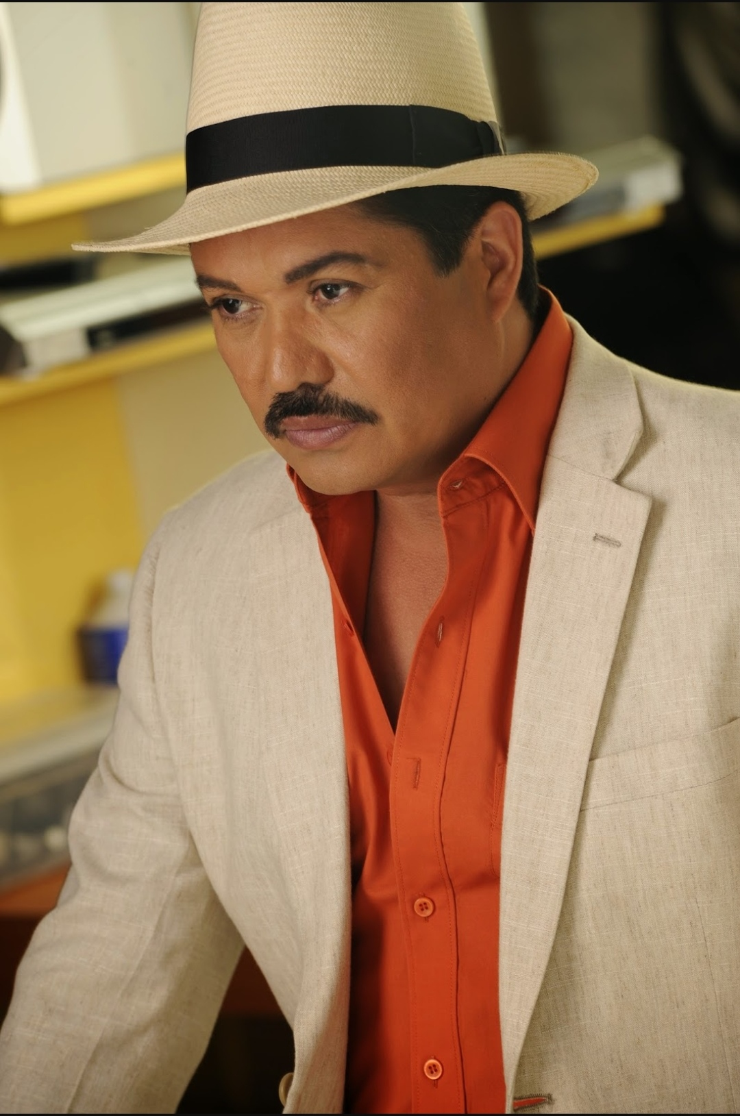 Luis Silva